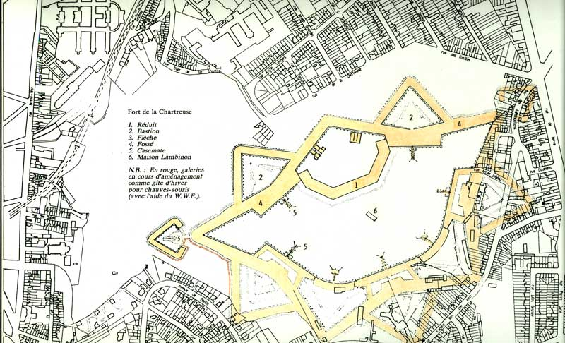 Plan du fort hollandais de la Chartreuse (Liège) construit entre 1817 et 1823. Certaines parties du fort ont été détruites en surface.